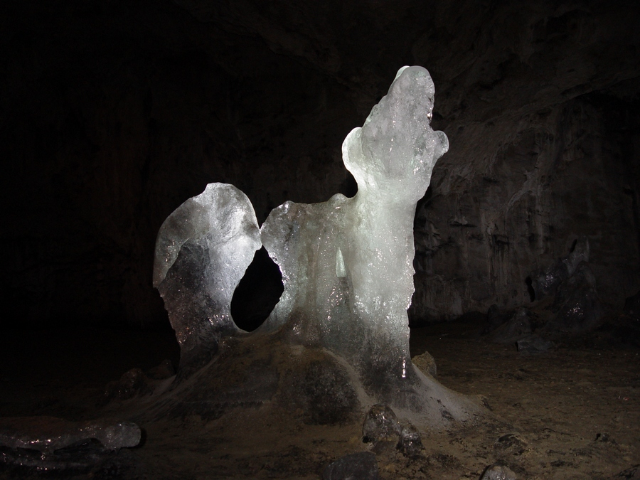 А́скинская пеще́ра — крупная полость Южного Урала мешкообразного типа. Является памятником природы всероссийского значения. С 2017 года вход в пещеру ограничен, пещера была передана в аренду Русскому географическому обществу для восстановления микроклимата и сохранения ледниковых реликтов